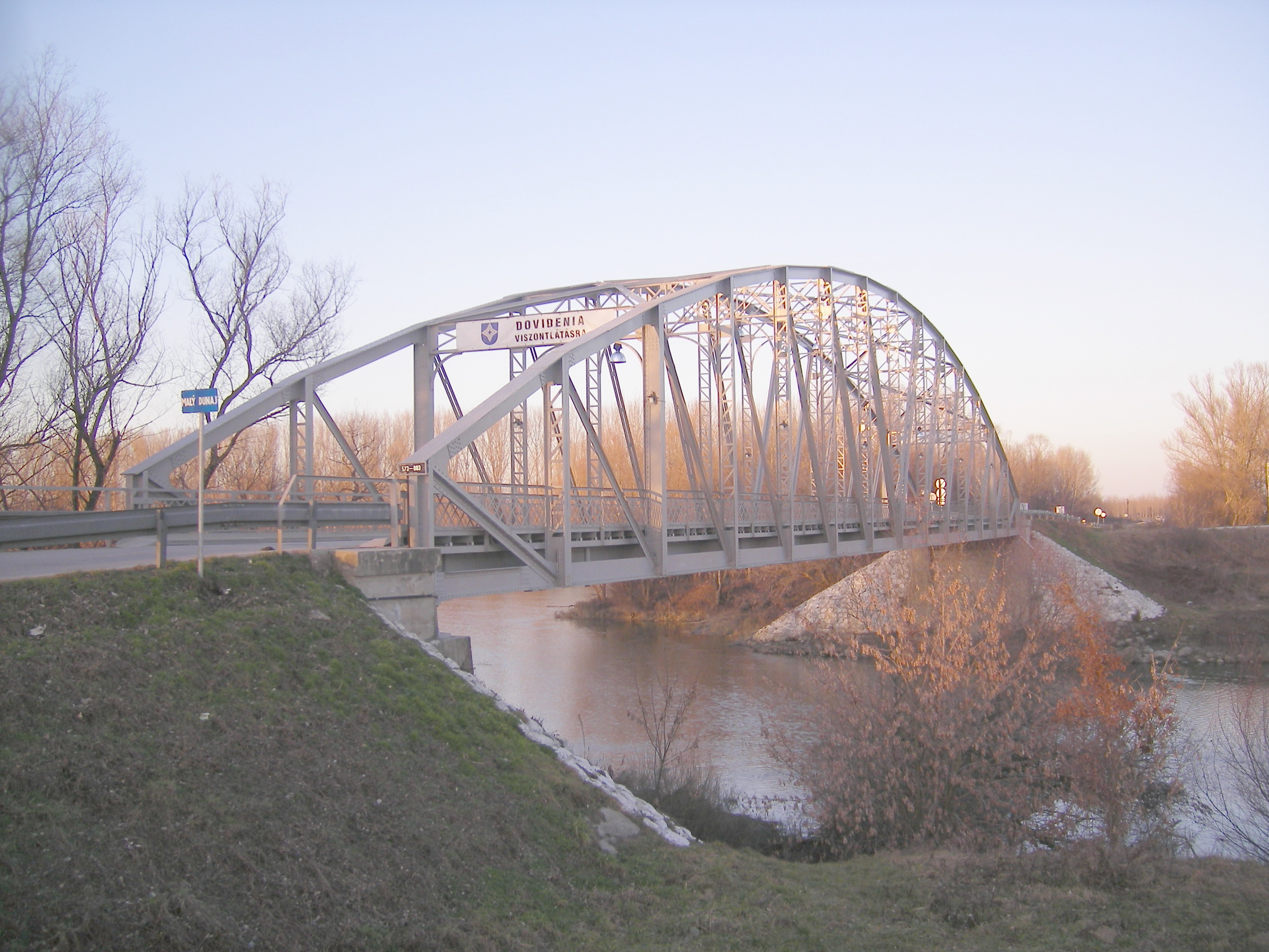 Gúta - a Kis-Duna hídja